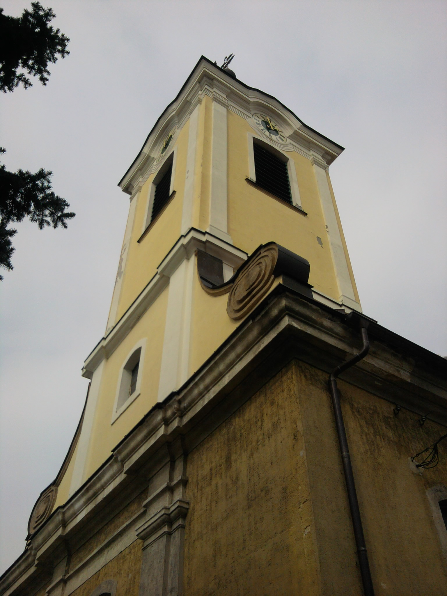 Perbáli római katolikus templom (Pest megye)